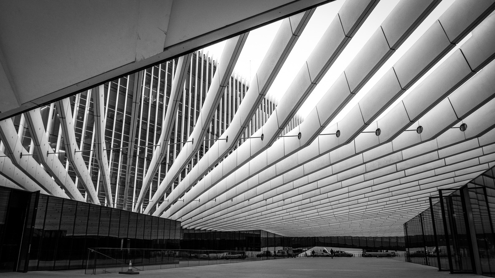 Lisboa